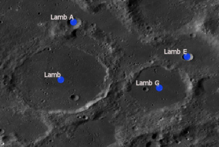 Cráter lunar Lamb. Cráteres satélite. (Imagen LRO)